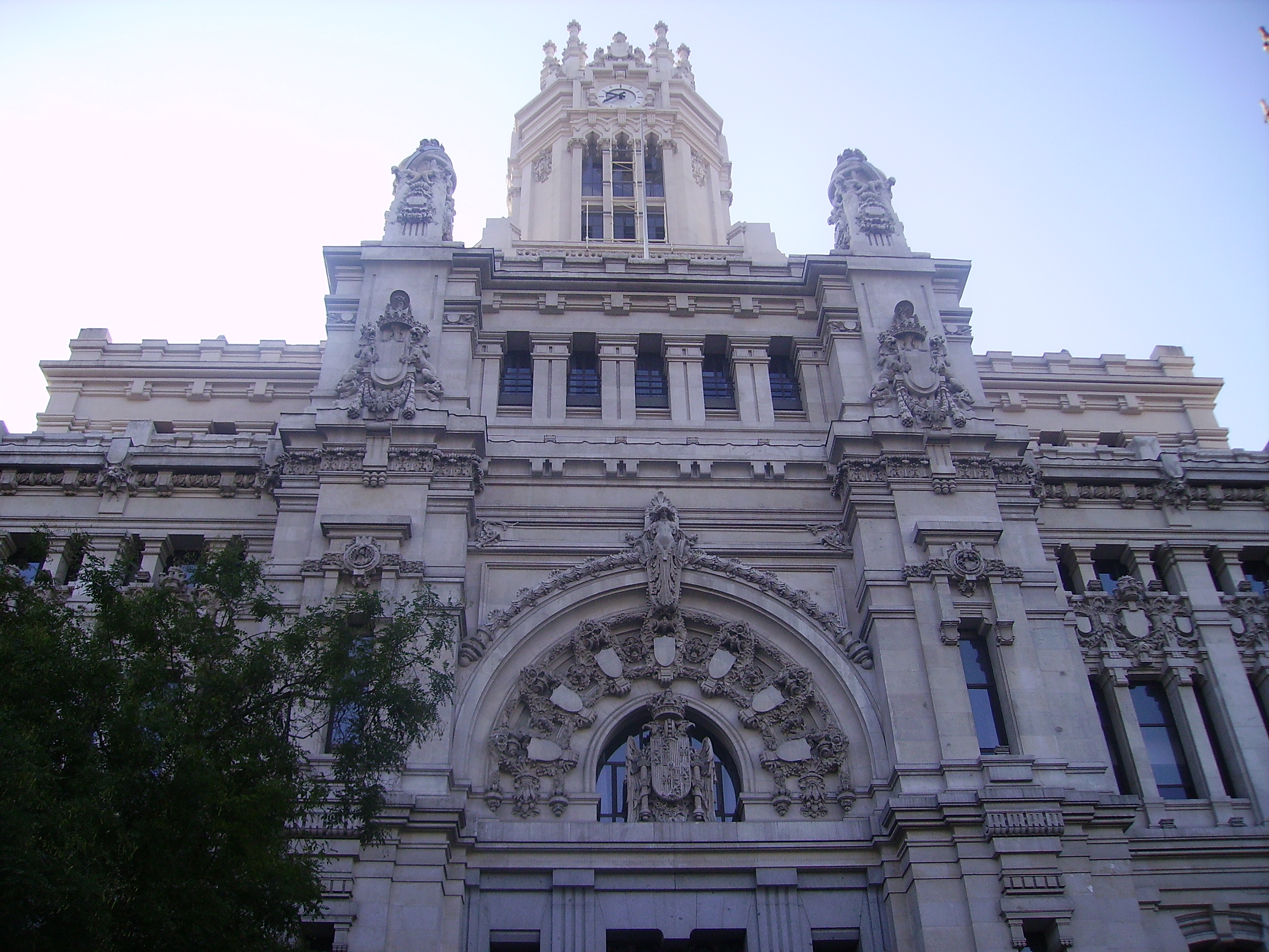 Fachada del palacio de Telecomunicaciones (Madrid) jorgegetafe